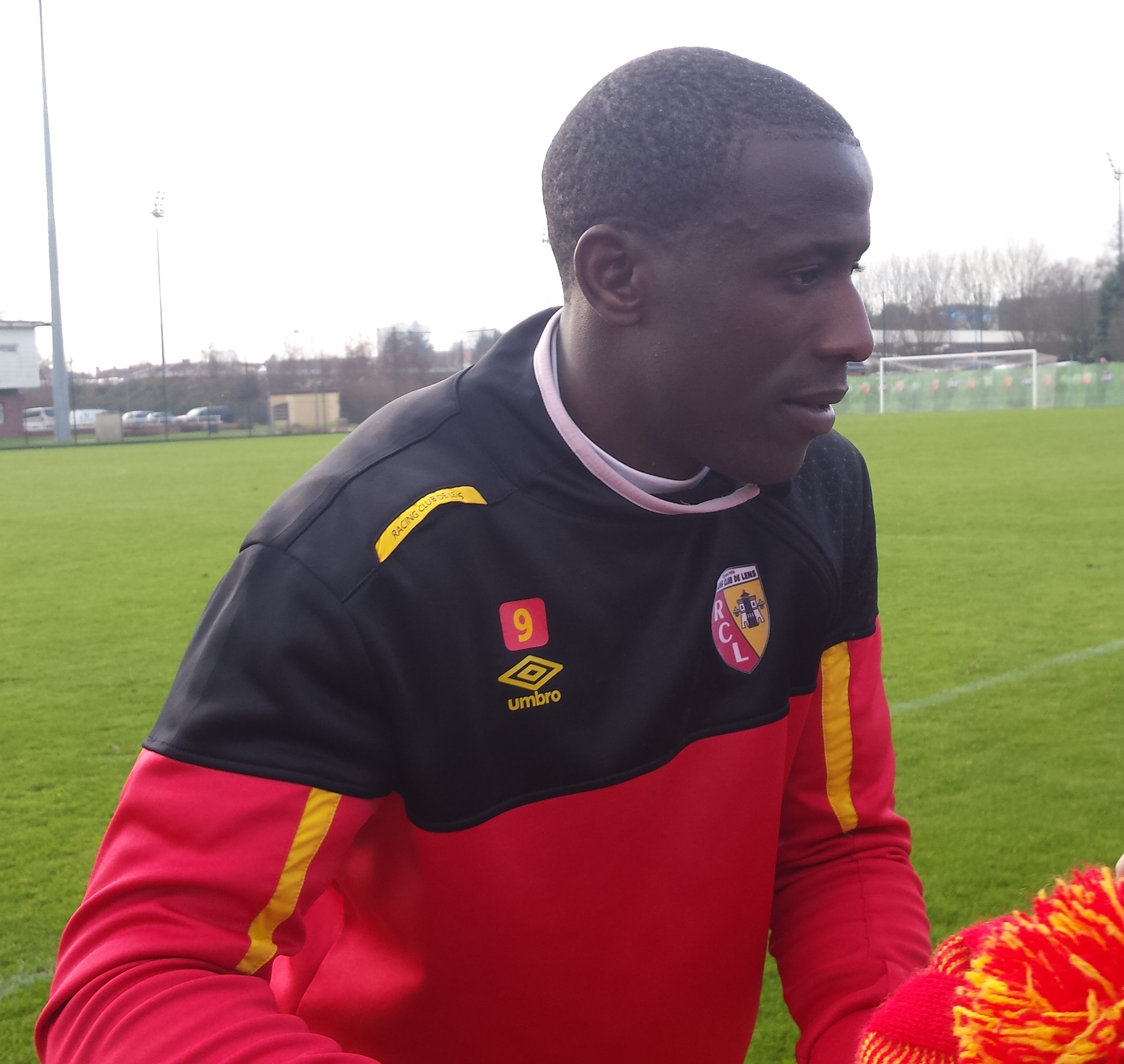 Adamo Coulibaly après un entraînement public du Racing Club de Lens, le 31 décembre 2014, sur le terrain "San Siro" du Centre Technique et Sportif de La Gaillette